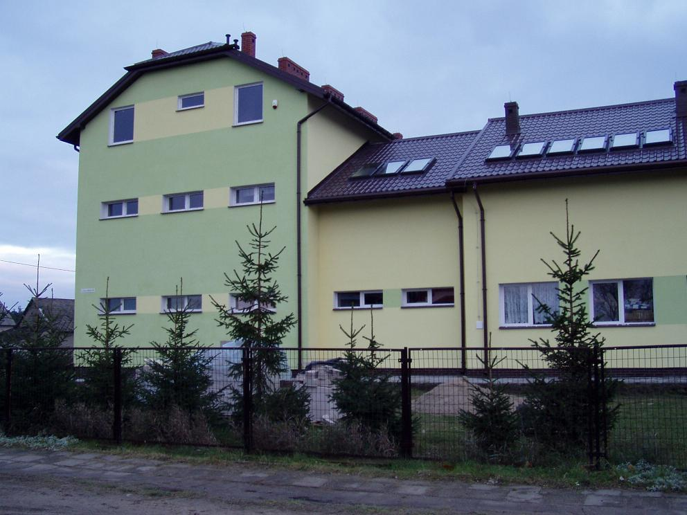 Zespół Szkół (Szkoła Podstawowa i Publiczne Gimnazjum) w Lipnikach.